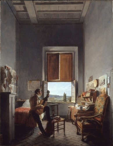 Huile sur papier marouflé sur toile - 57,8 x 45,1 cm New York, The Metropolitan Museum of Art Photo : The Metropolitan Museum of Art (domaine public)